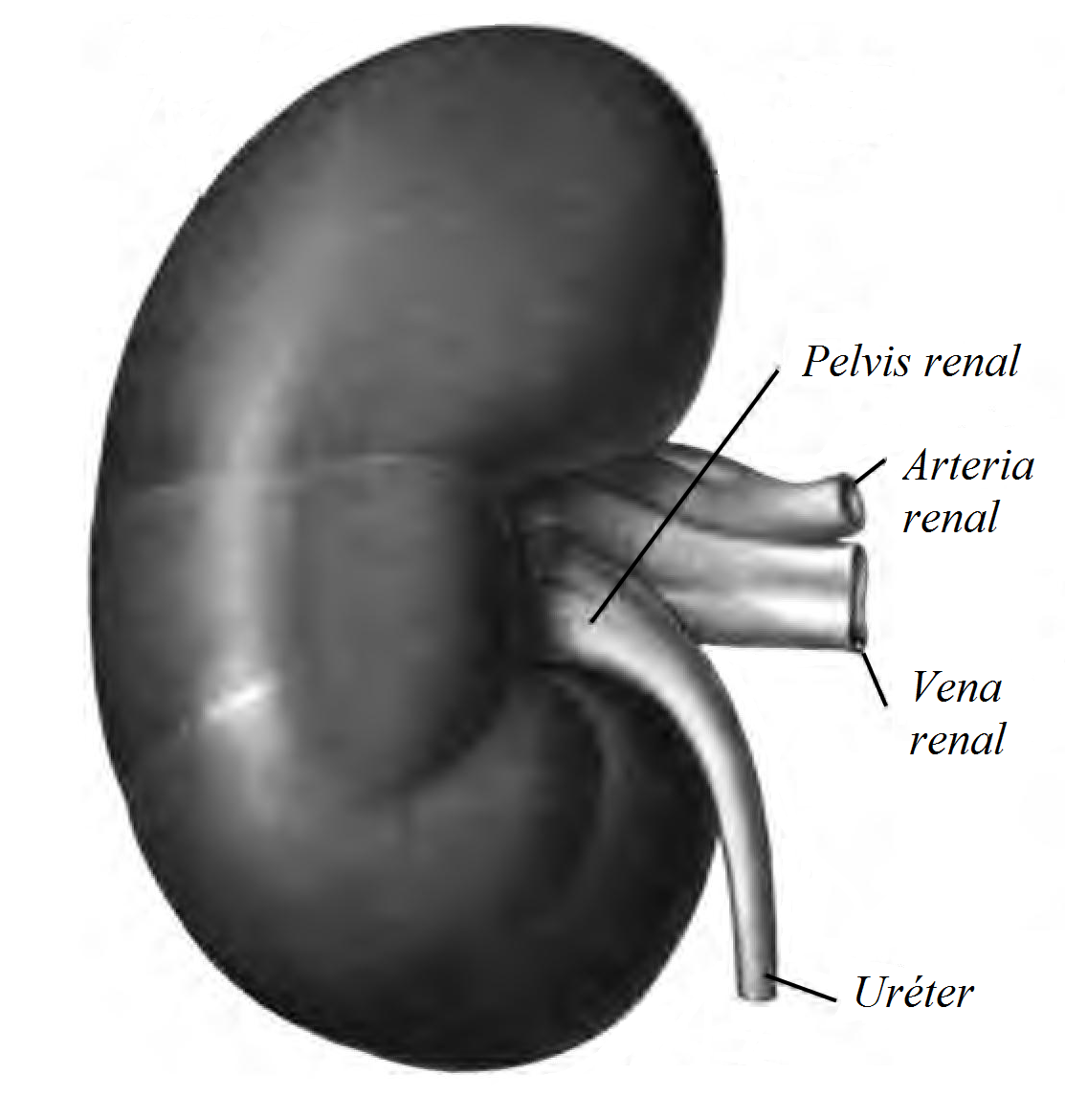 Imagen rotulada de un riñón derecho humano